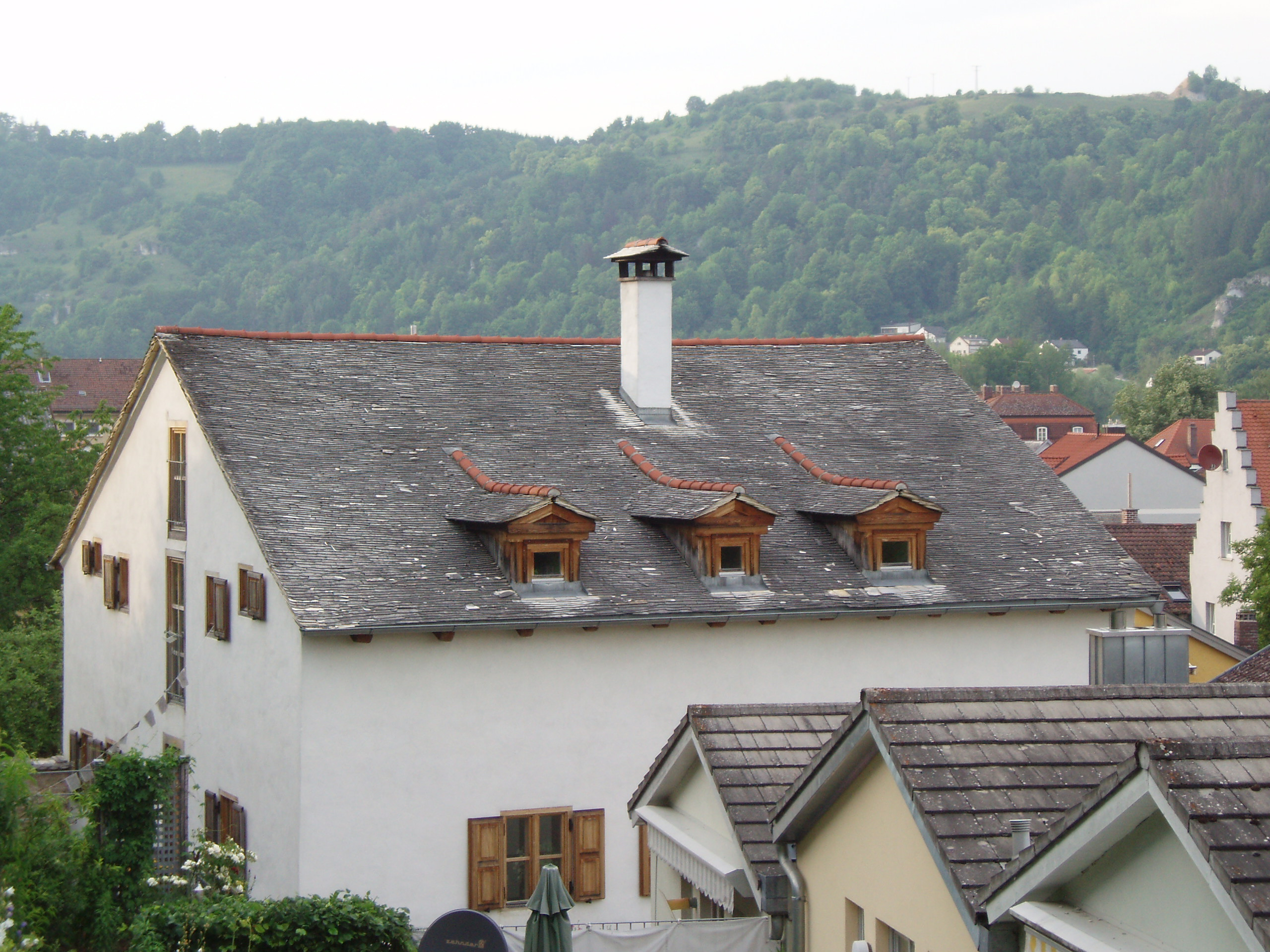 Kalkplatten Legschiefer Dach in Eichstätt